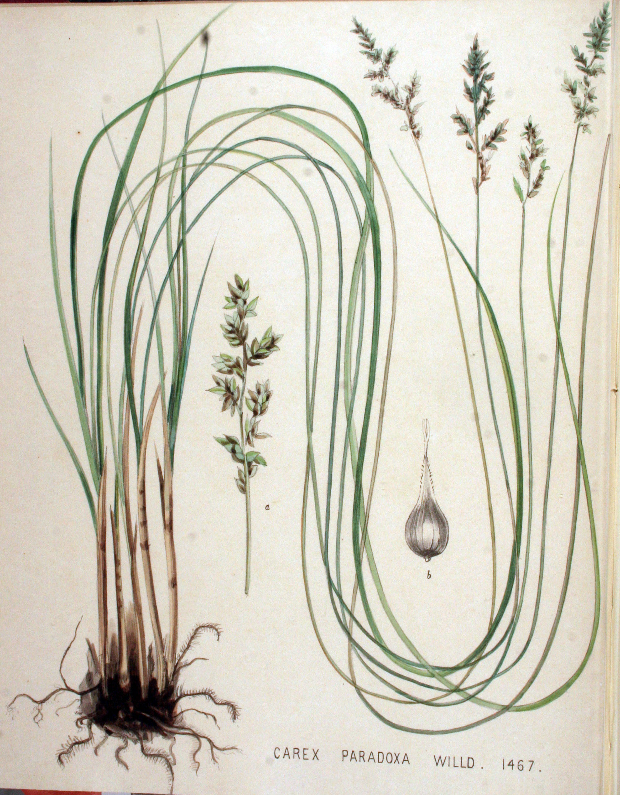 Carex appropinquata C.F. Schumach. (Syn. Carex paradoxa Wild. non J.F. Gmel.)